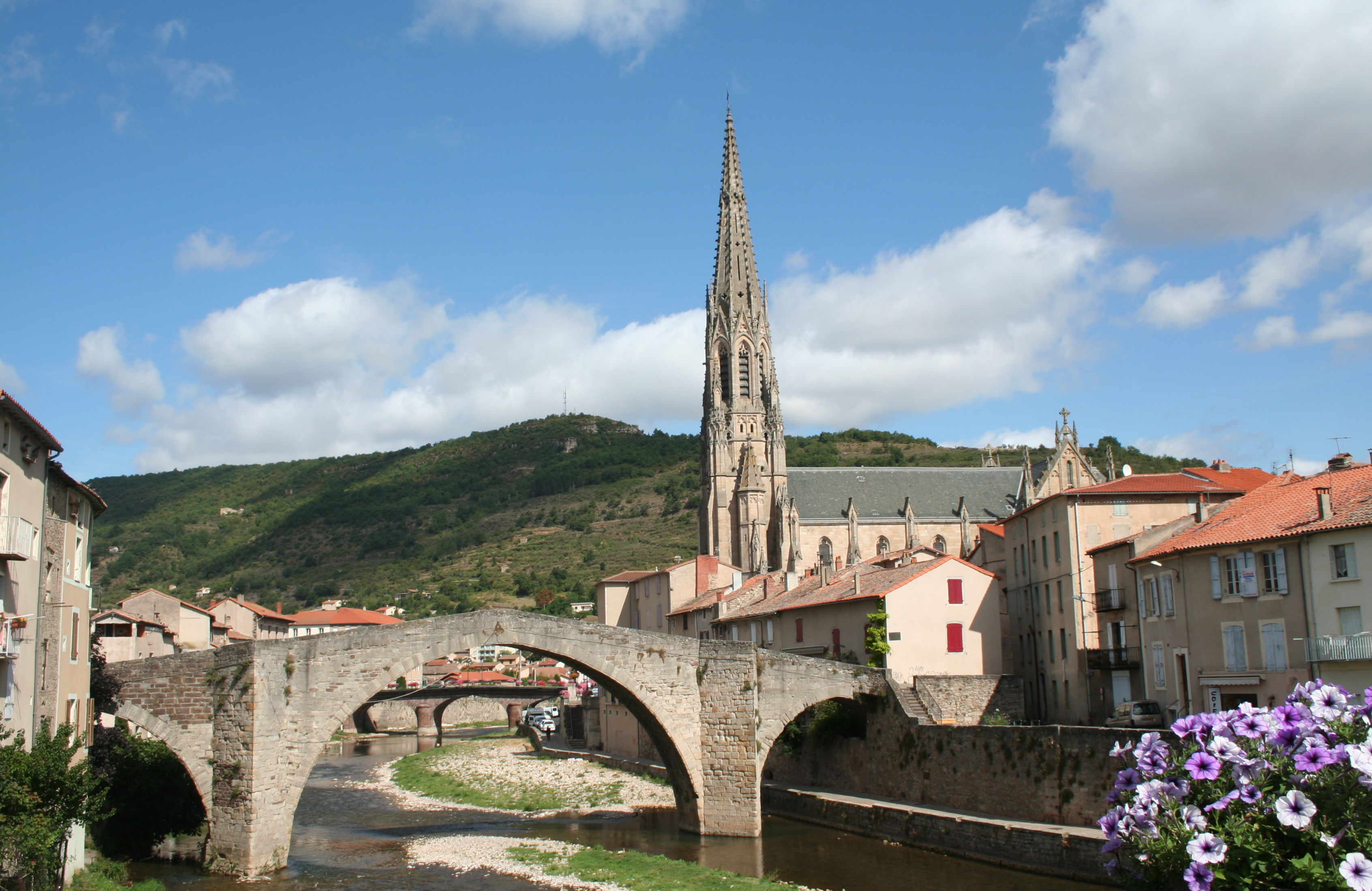 Saint-Affrique (Aveyron, Midi-Pyrénées, France) - pont vieux sur la Sorgues et église Notre-Dame.